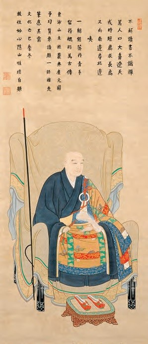 隠山惟琰の頂相。